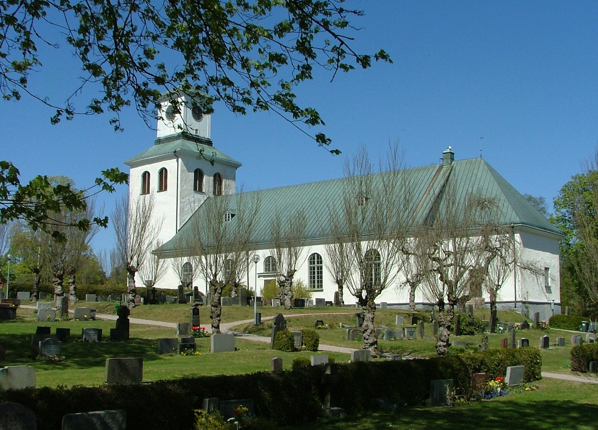 Linneryds kyrka.